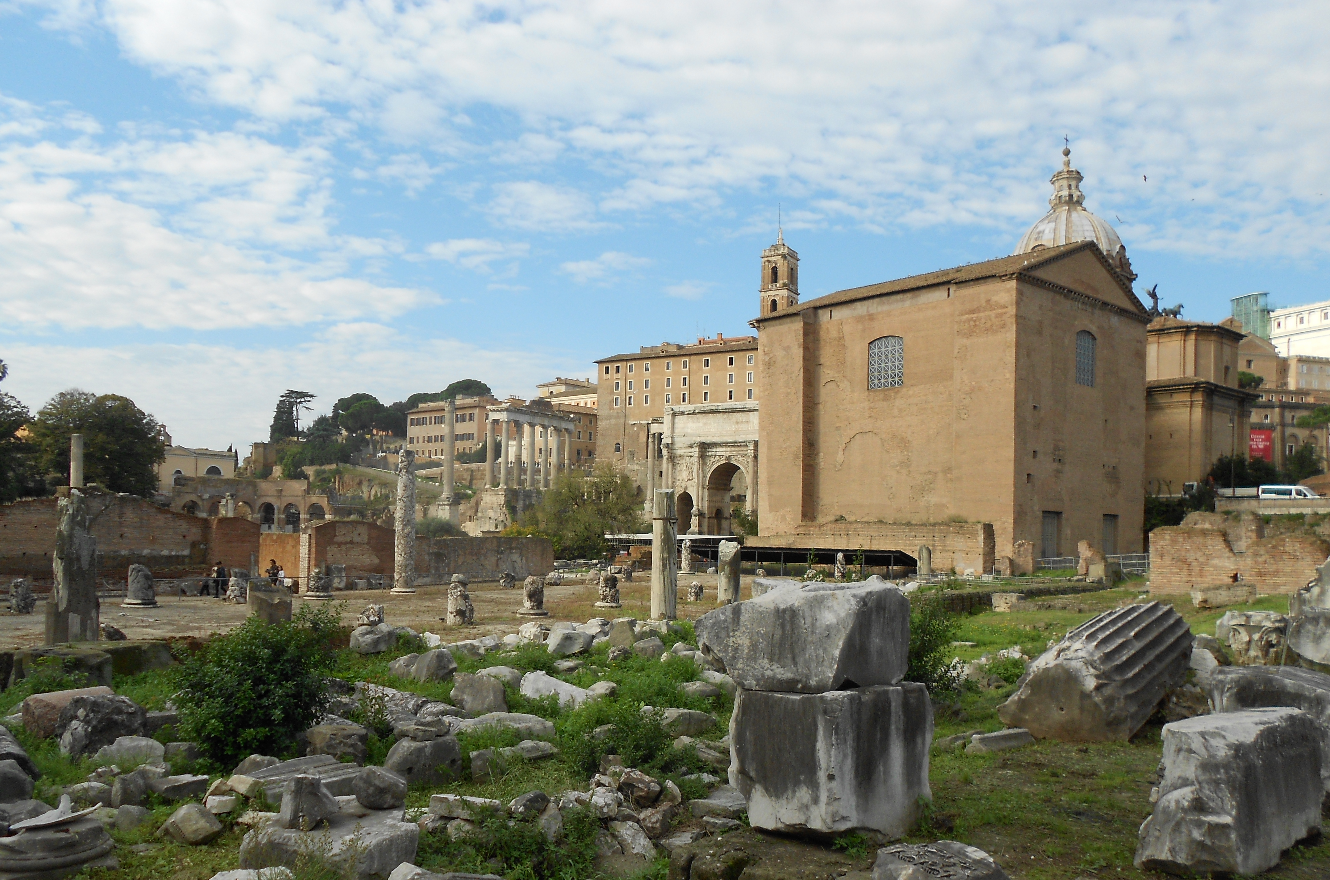 Curia Iulia auf dem Forum Romanum